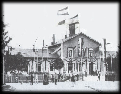 Der erste Wormser Bahnhof 1868. Der Flaggenschmuck war zum Empfang des preußischen Königs und späteren Kaiser Wilhelm I. angebracht, der zur Einweihung des Lutherdenkmals Worms besuchte (vgl.: Ralph Häussler: Eisenbahnen in Worms. Hamm 2003. ISBN 3-935651-10-4, S. 8).